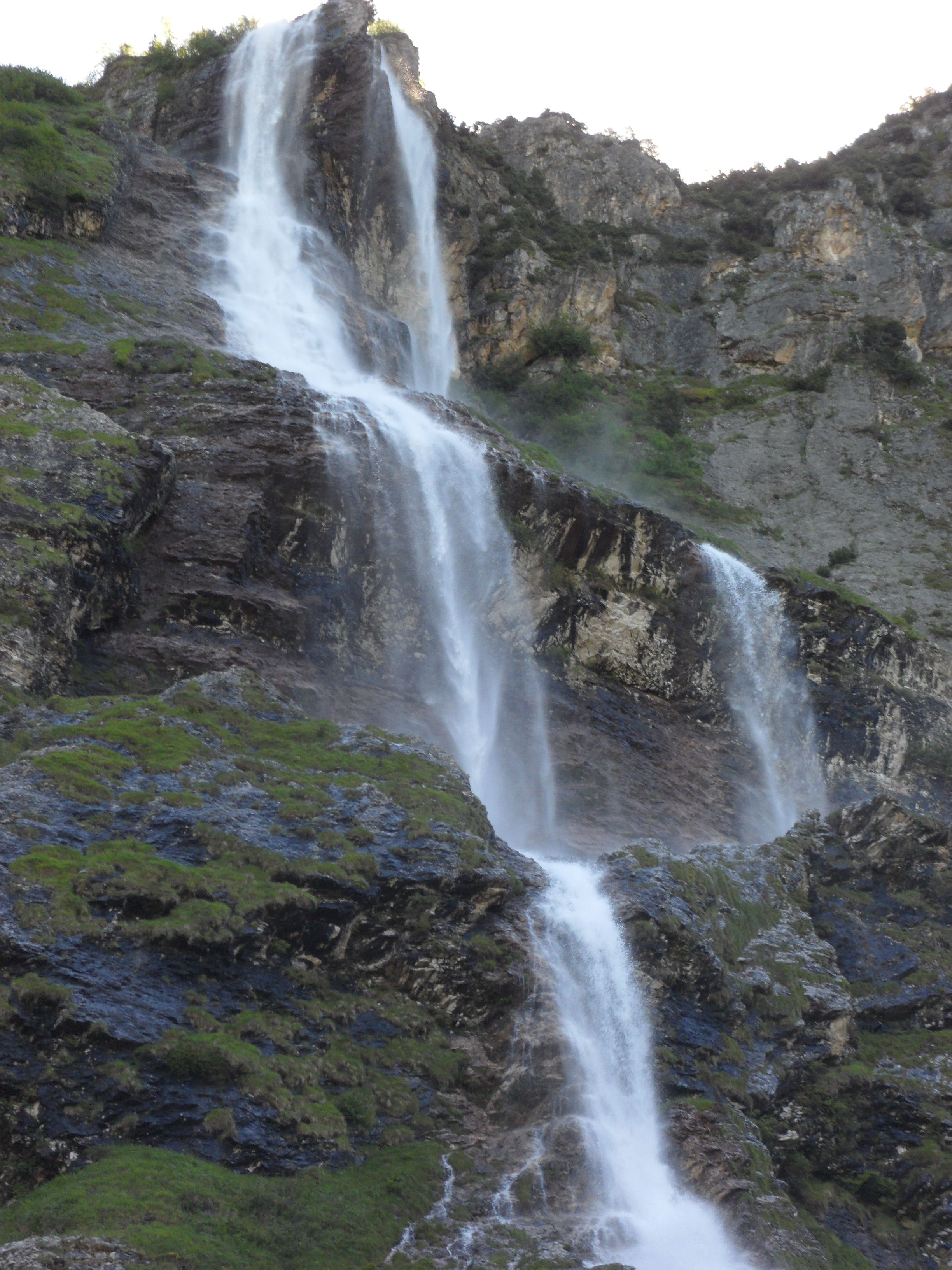 Vue de la cascade de la Vuzelle à Planay, en Savoie (Vanoise).